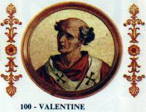 Pope Valentine